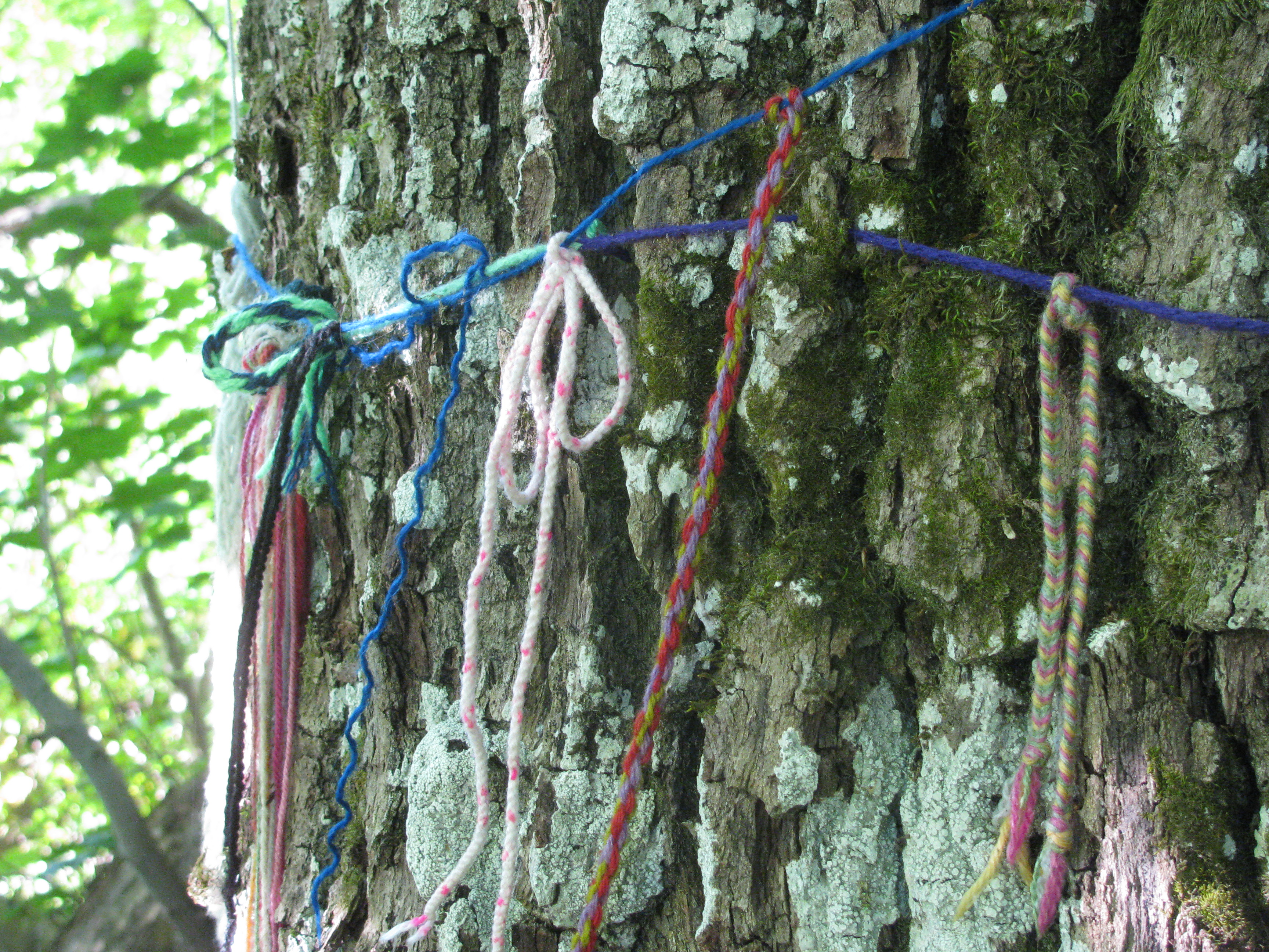 Paelad Vana-Vigala hiie tammil